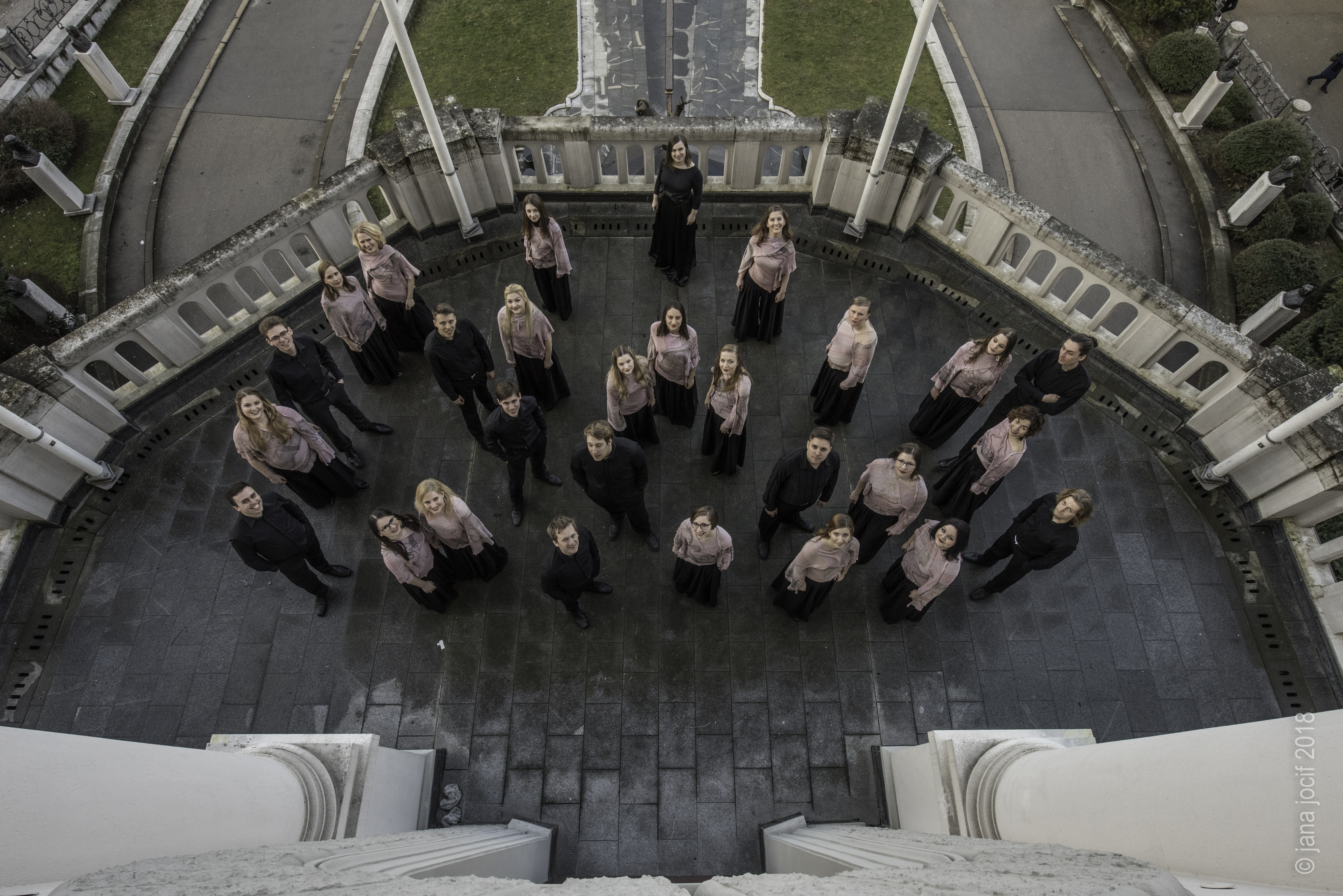 APZ Tone Tomšič Univerze v Ljubljani leta 2018 z dirigentko Jerico Gregorc Bukovec.